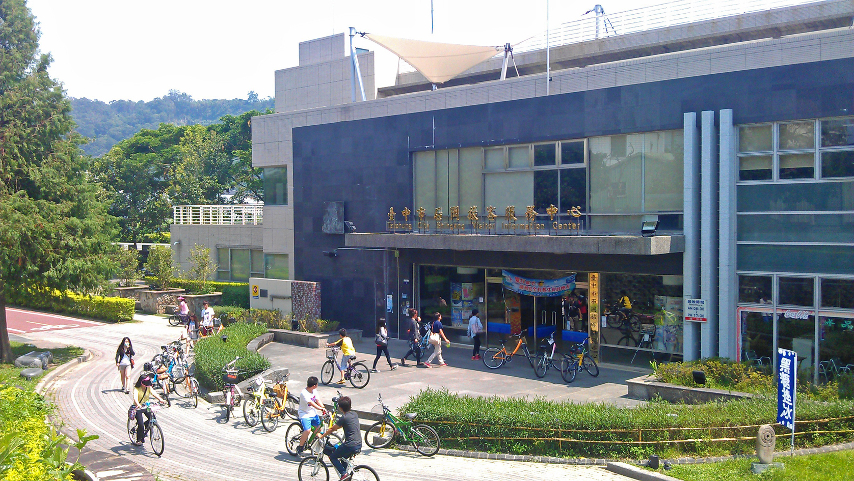 臺中市石岡旅客服務中心（石岡車站舊址）